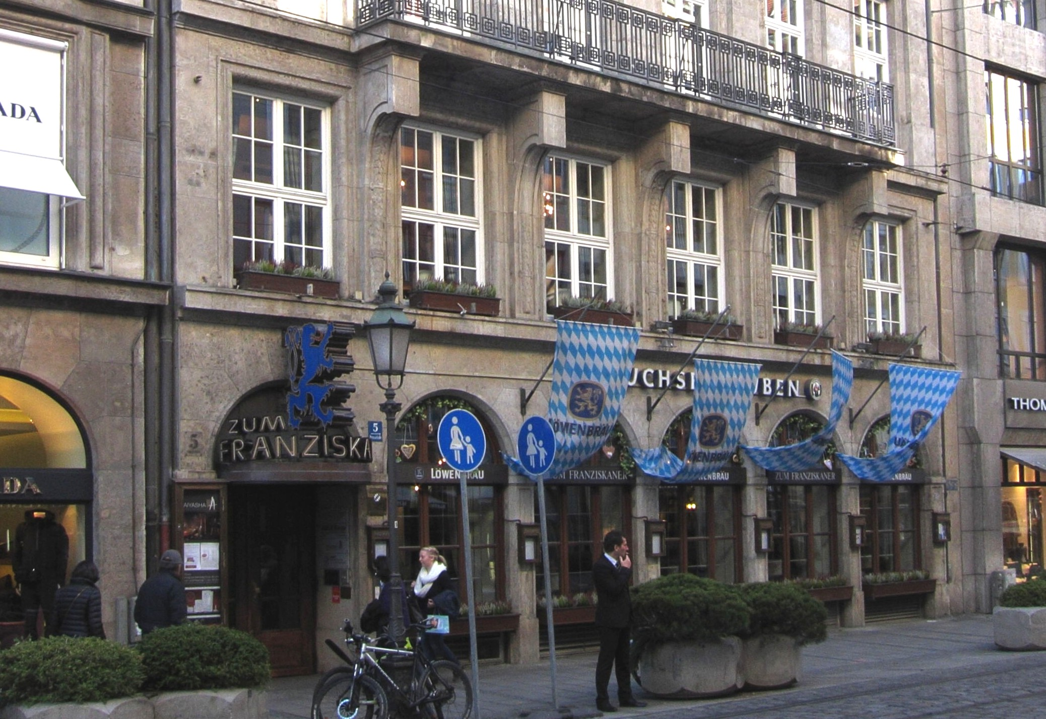 Perusastraße 5; Geschäftshaus mit Gaststätte "Zum Franziskaner", München